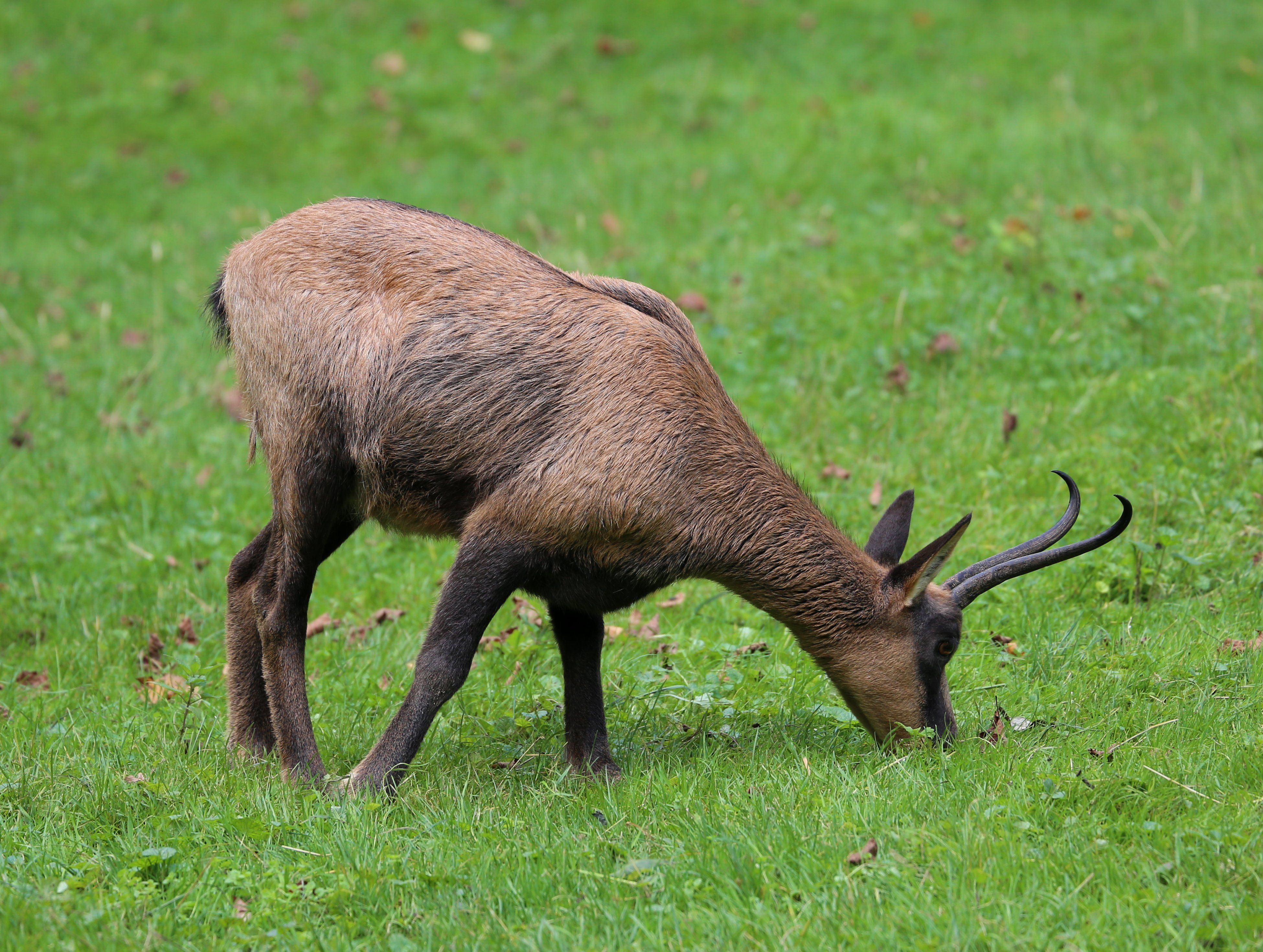 Tierpark Hellabrunn, Abruzzengaemse, Rupicapra pyrenaica ornata